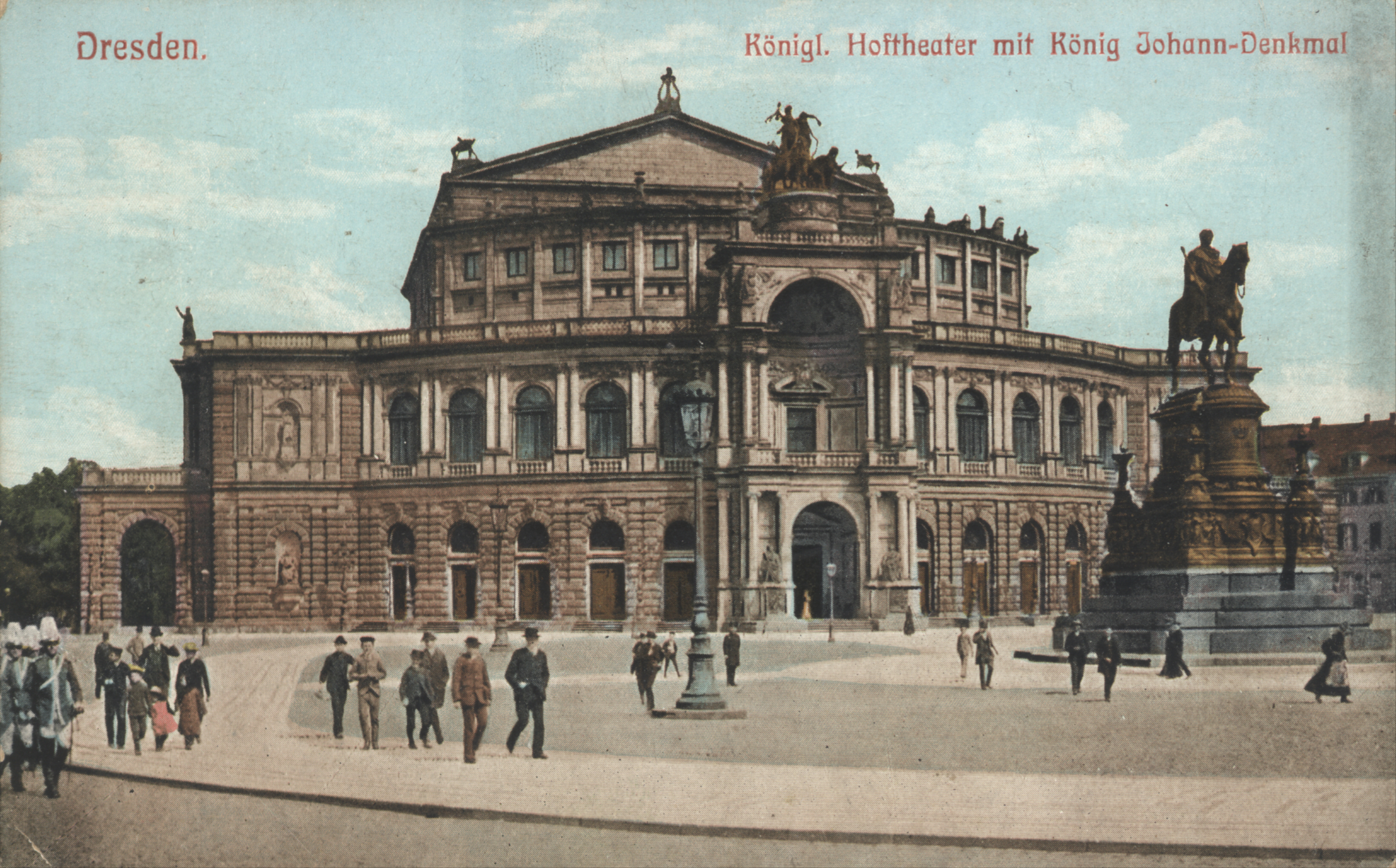 Dresden, Hoftheater (Semperoper), Postkarte um 1900, Verlag Hermann Poy, Dresden; 64076